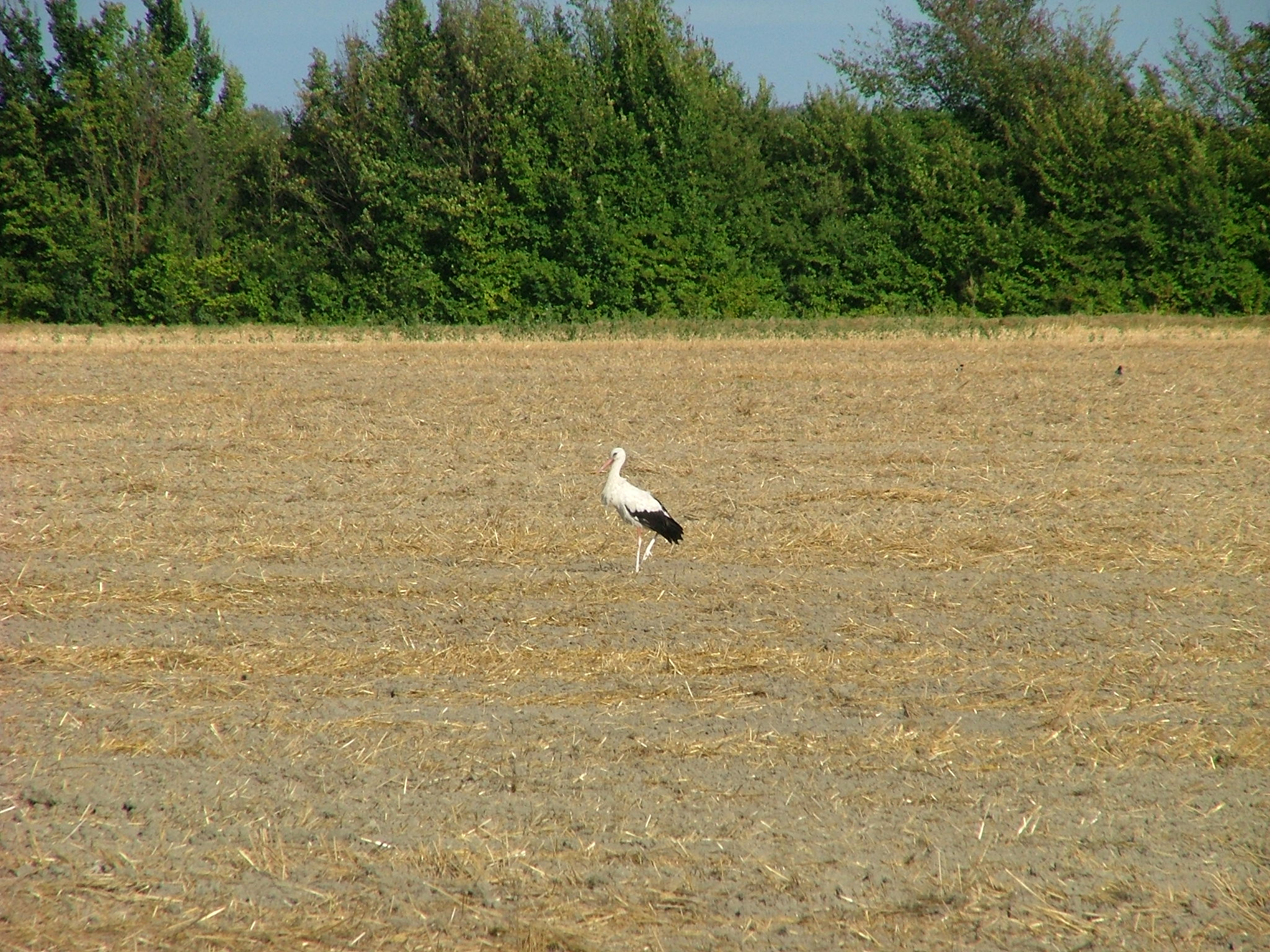 Fehér gólya